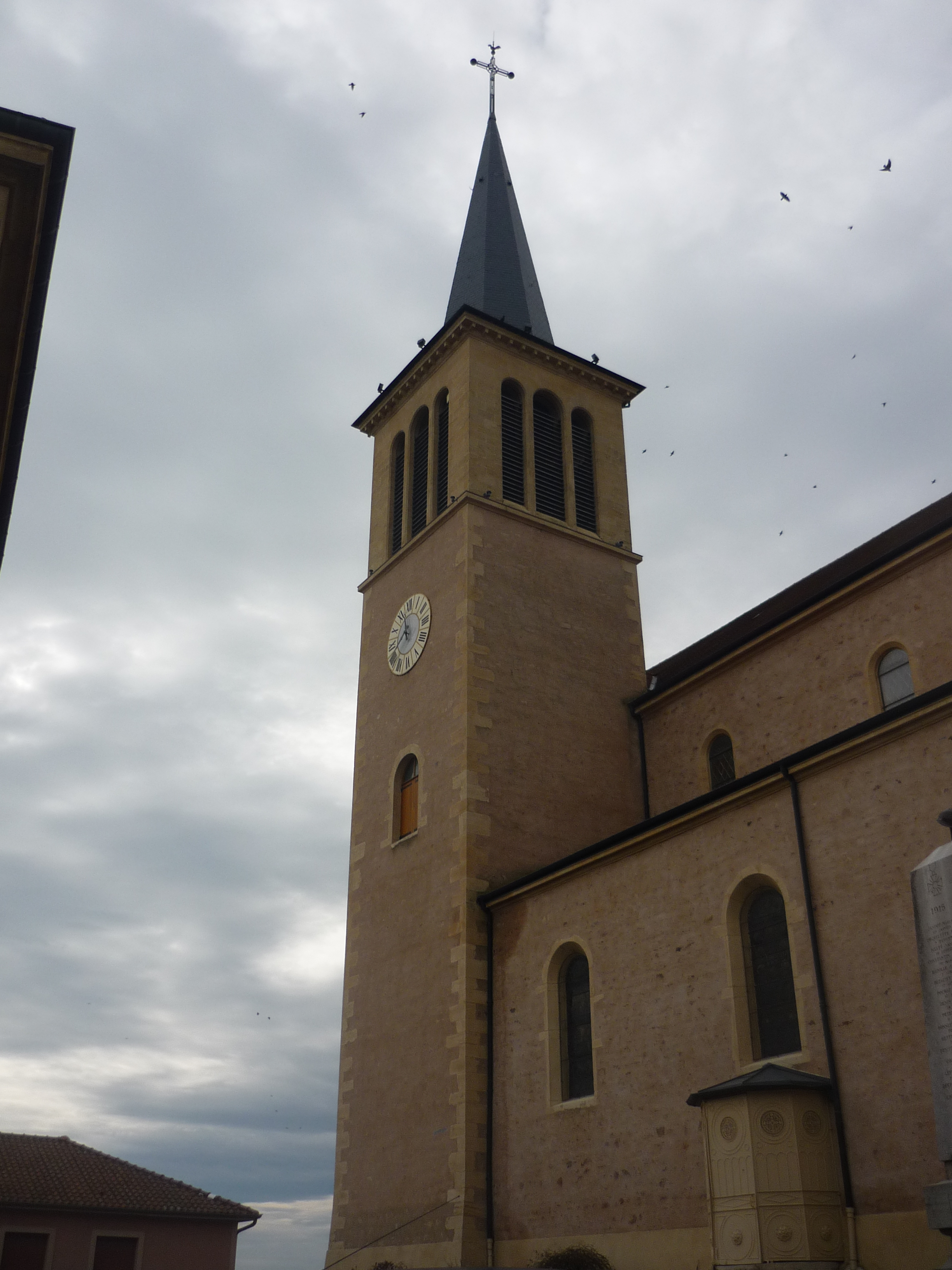 Église de Montagny, dans le département de la Loire